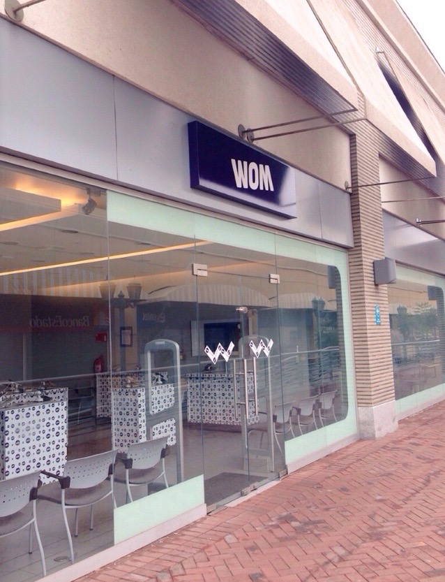 la serena